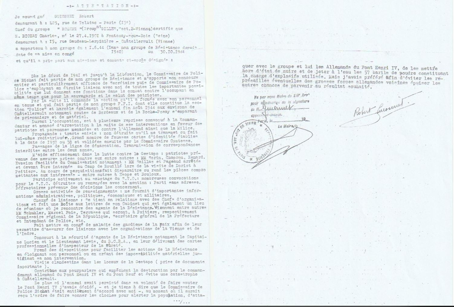 Attestation du Capitaine Robert Guionnet (GR16P 280519) en faveur de Charles Bichat (GR16P 58444)